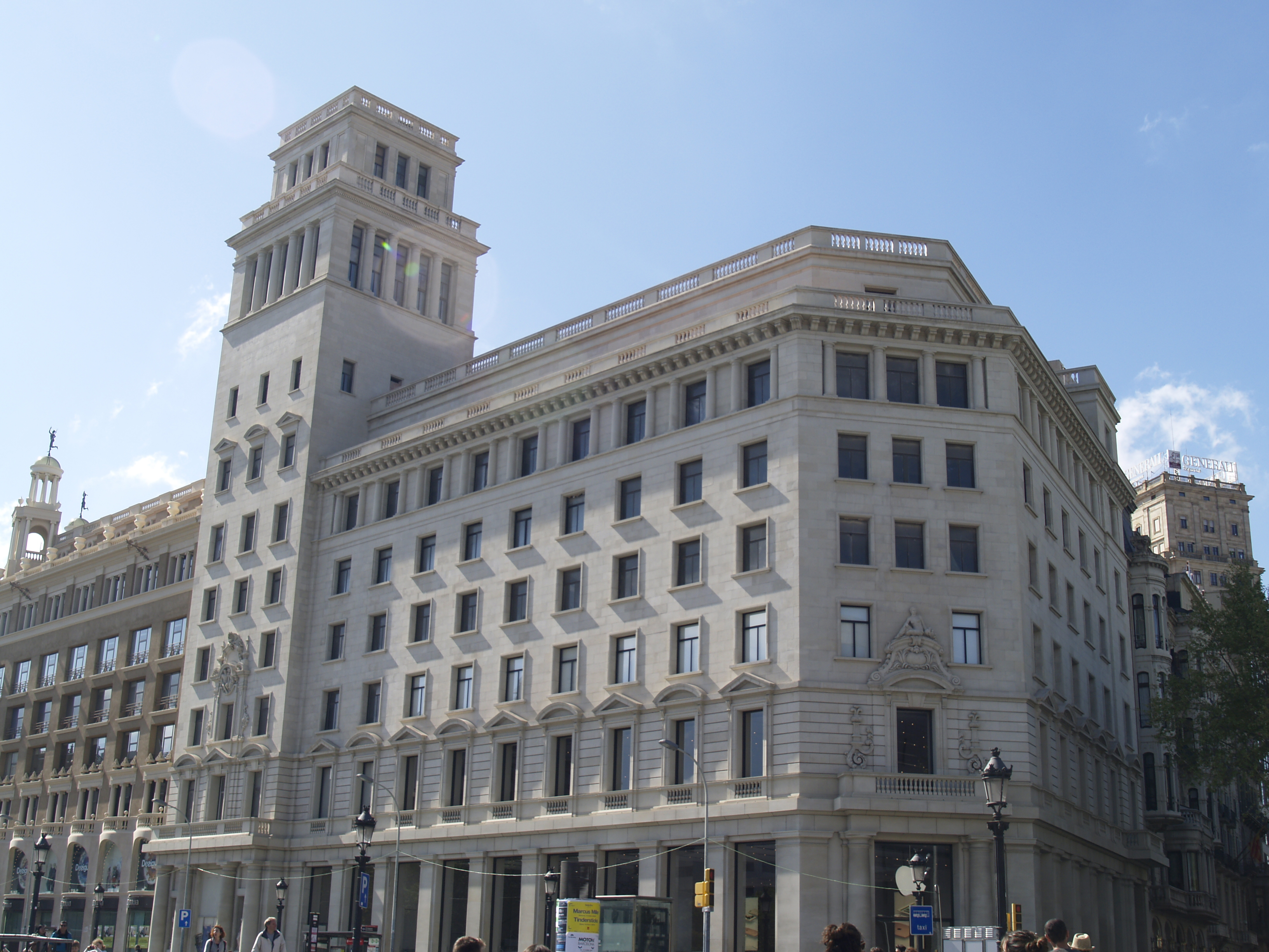 {nombre }